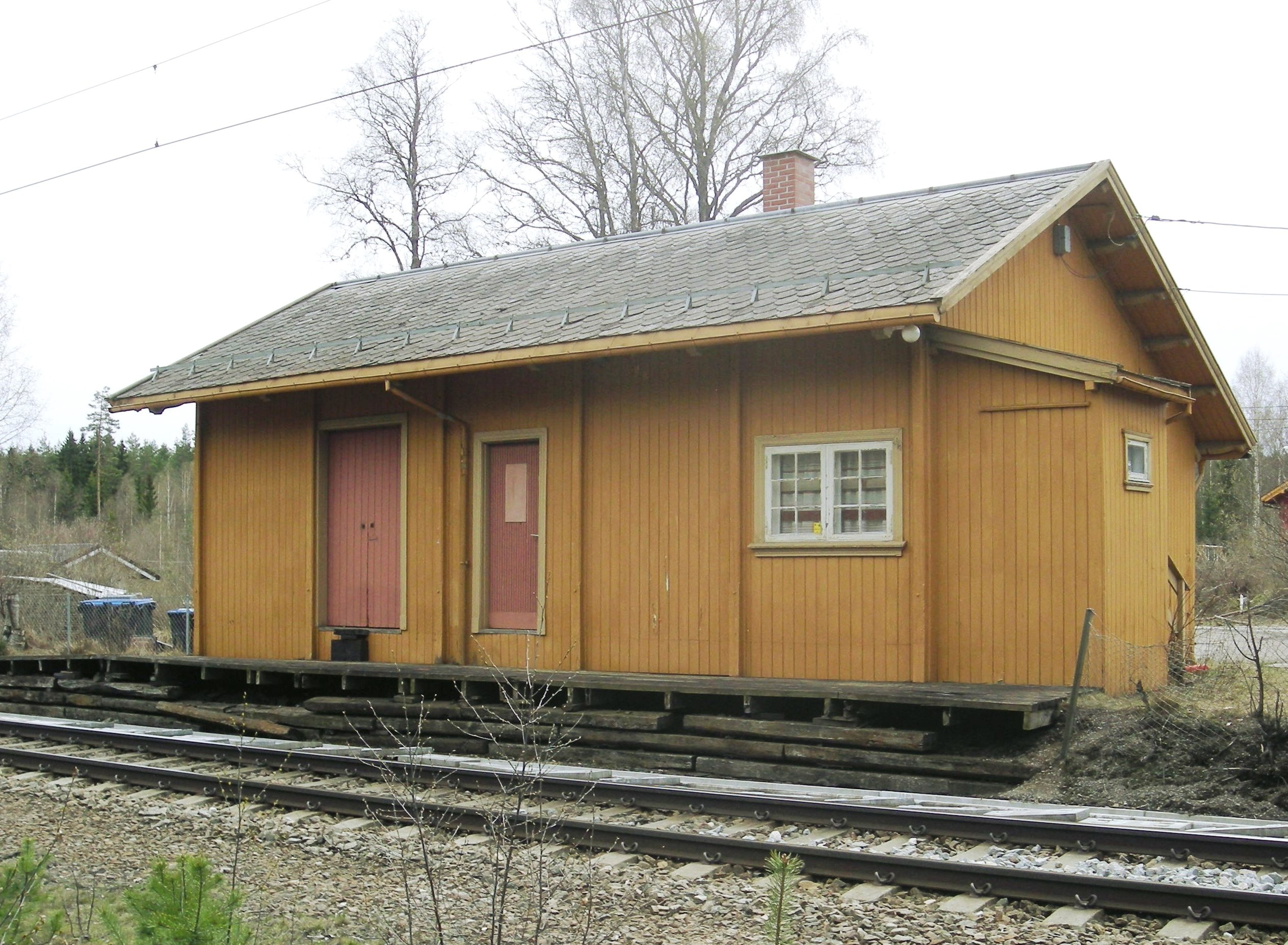 Granli stasjon